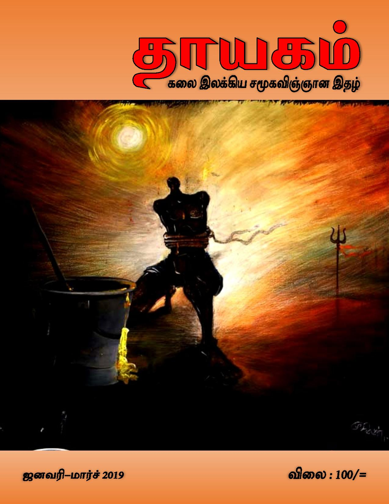 தாயகம் கலை இலக்கிய சமூகவிஞ்ஞான இதழ்